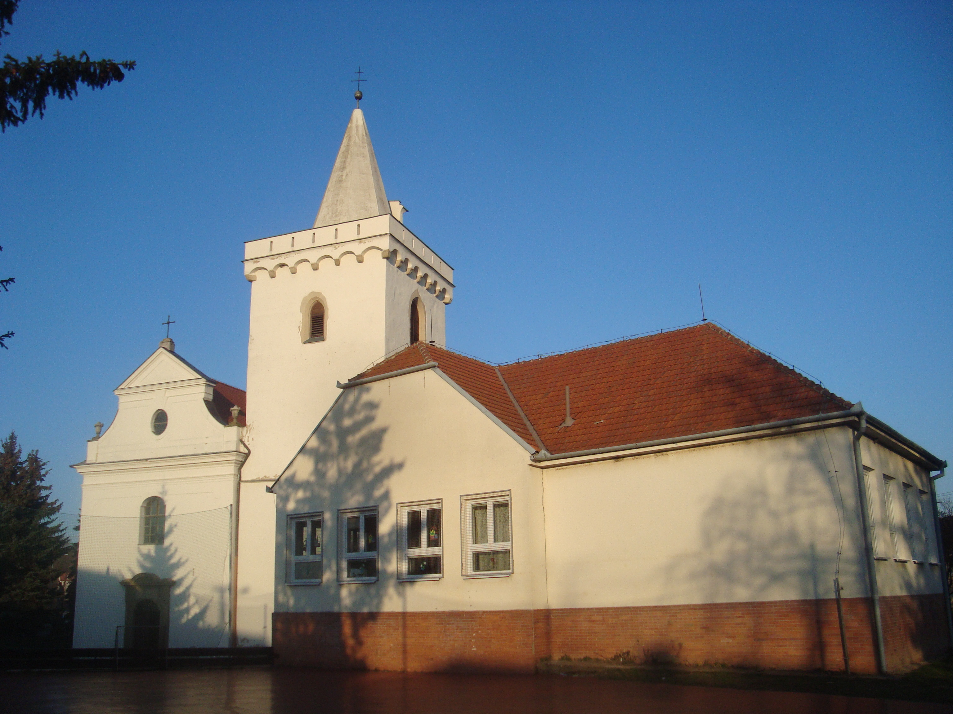 Kostel Navštívení Panny Marie, Pravlov